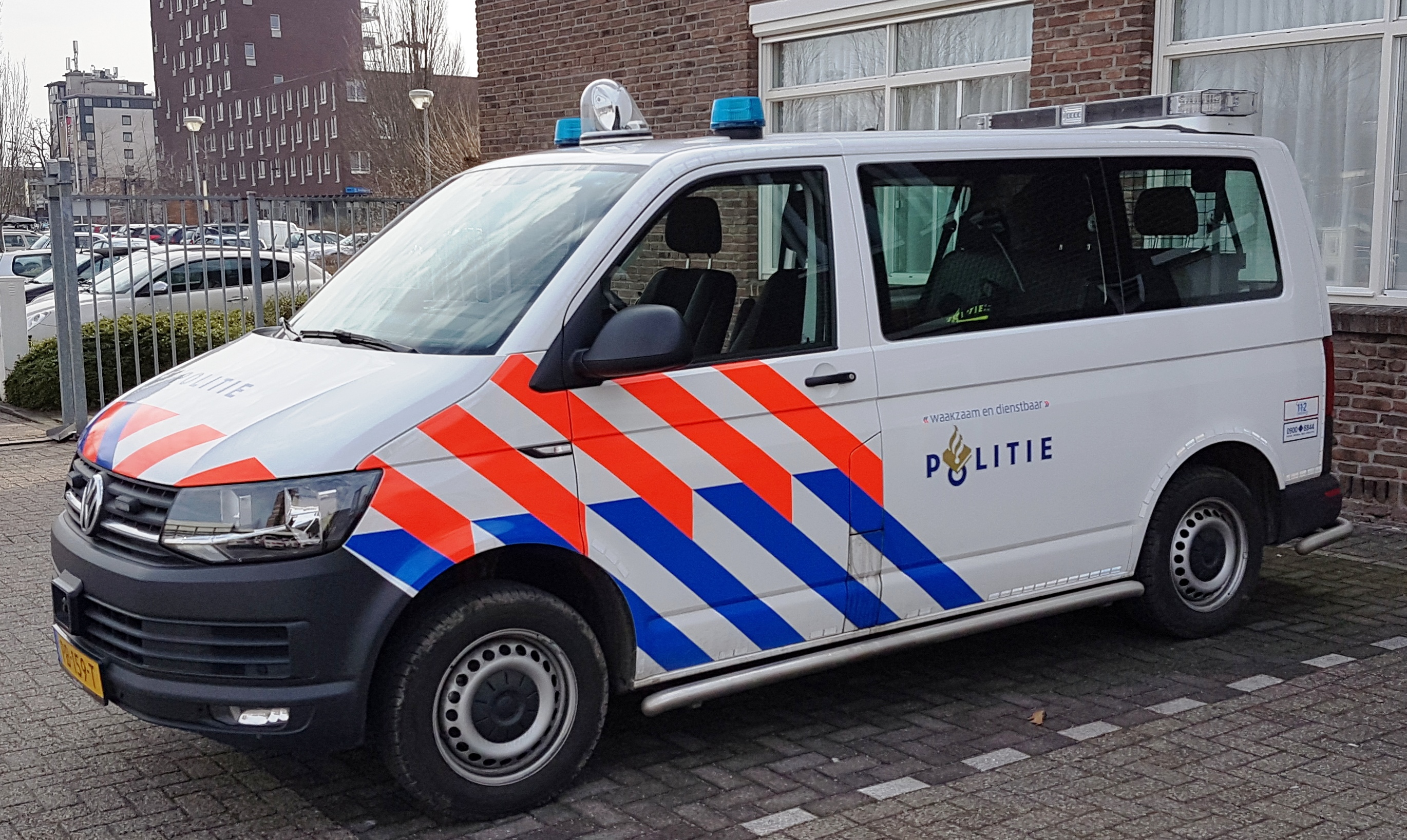 VW transporter politie auto